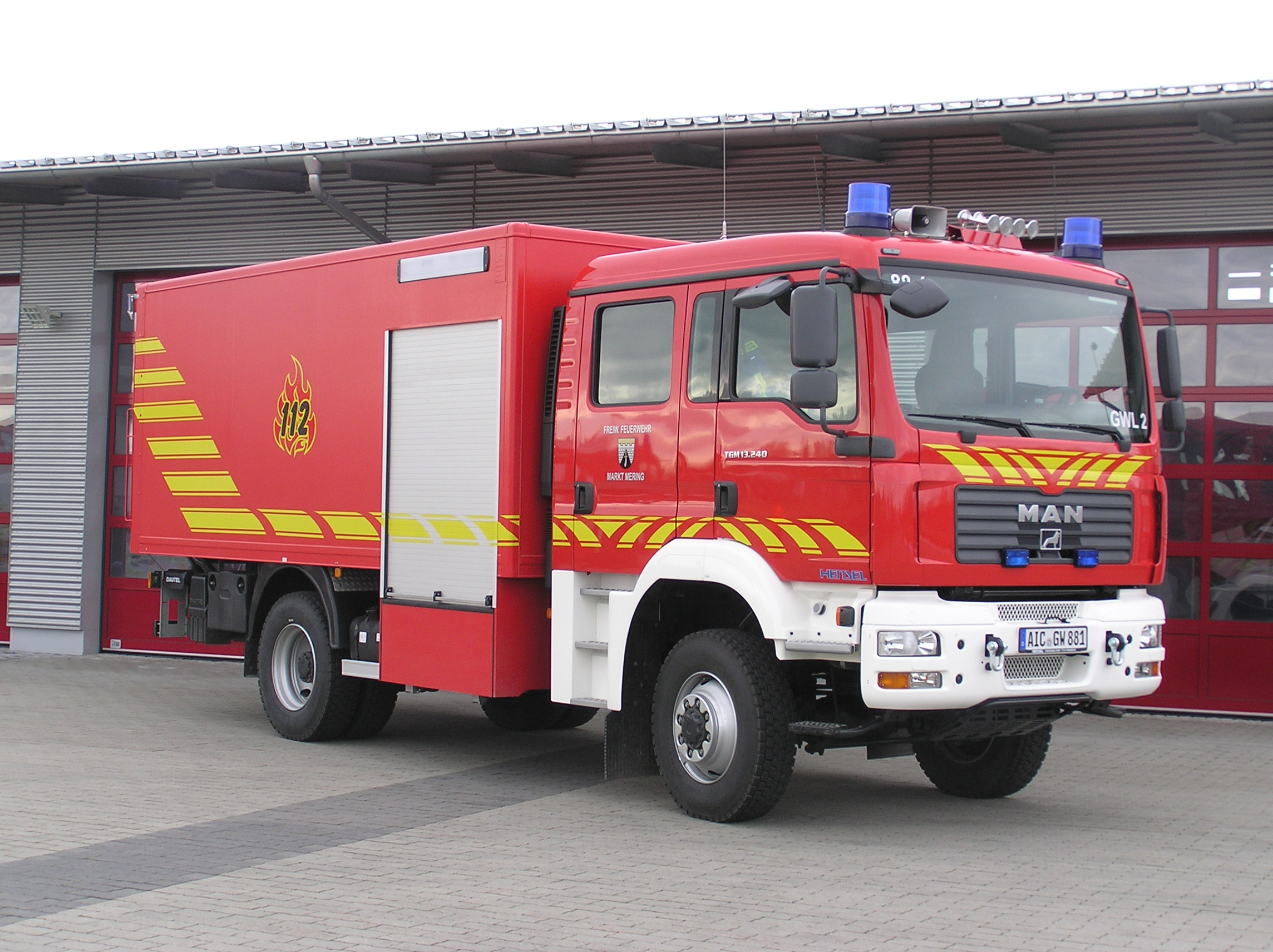 Gerätewagen Logistik 2 der Feuerwehr Mering. (GW-L2)